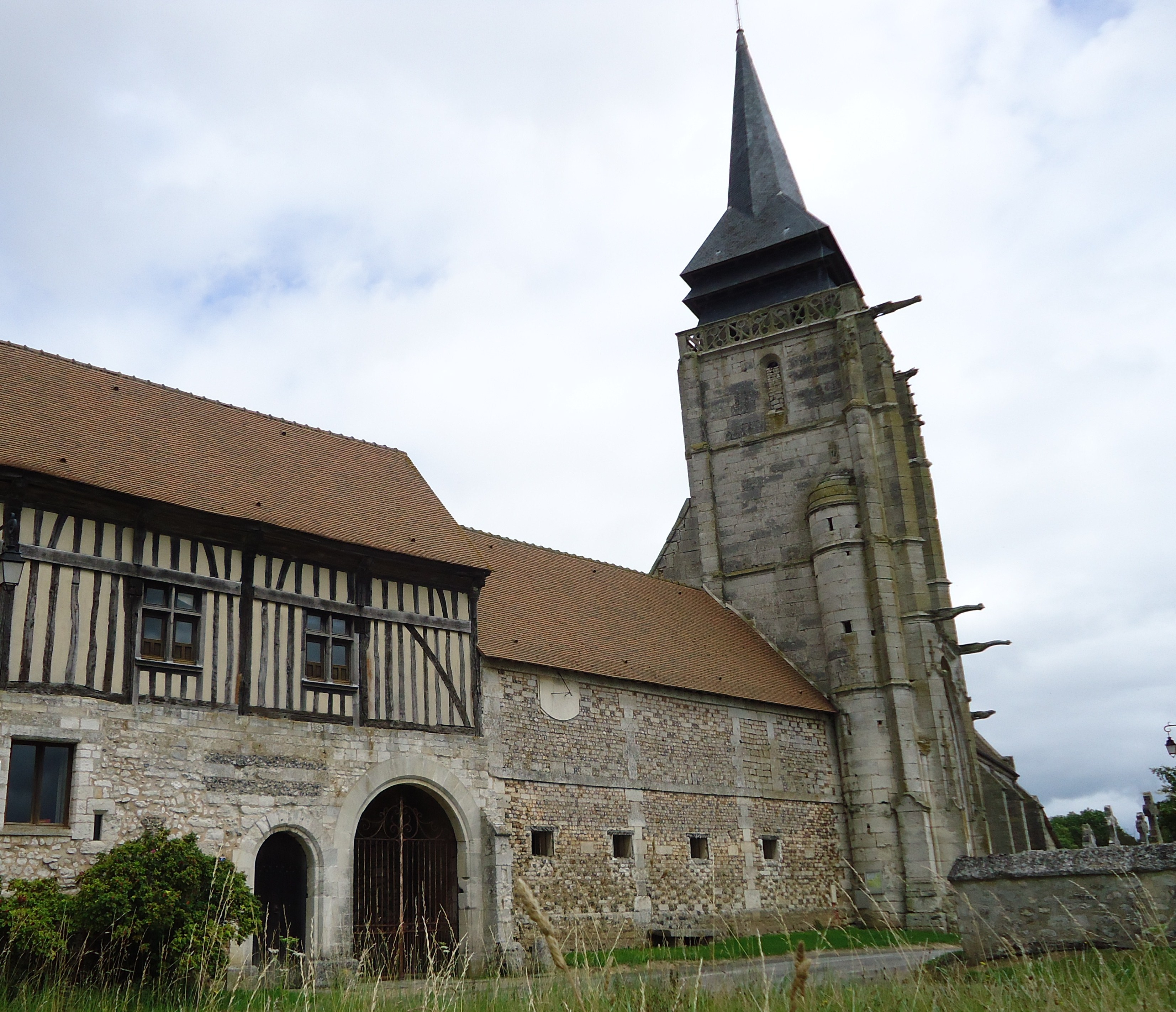 Le Mesnil-Jourdan, église Notre-Dame XVe (MH)